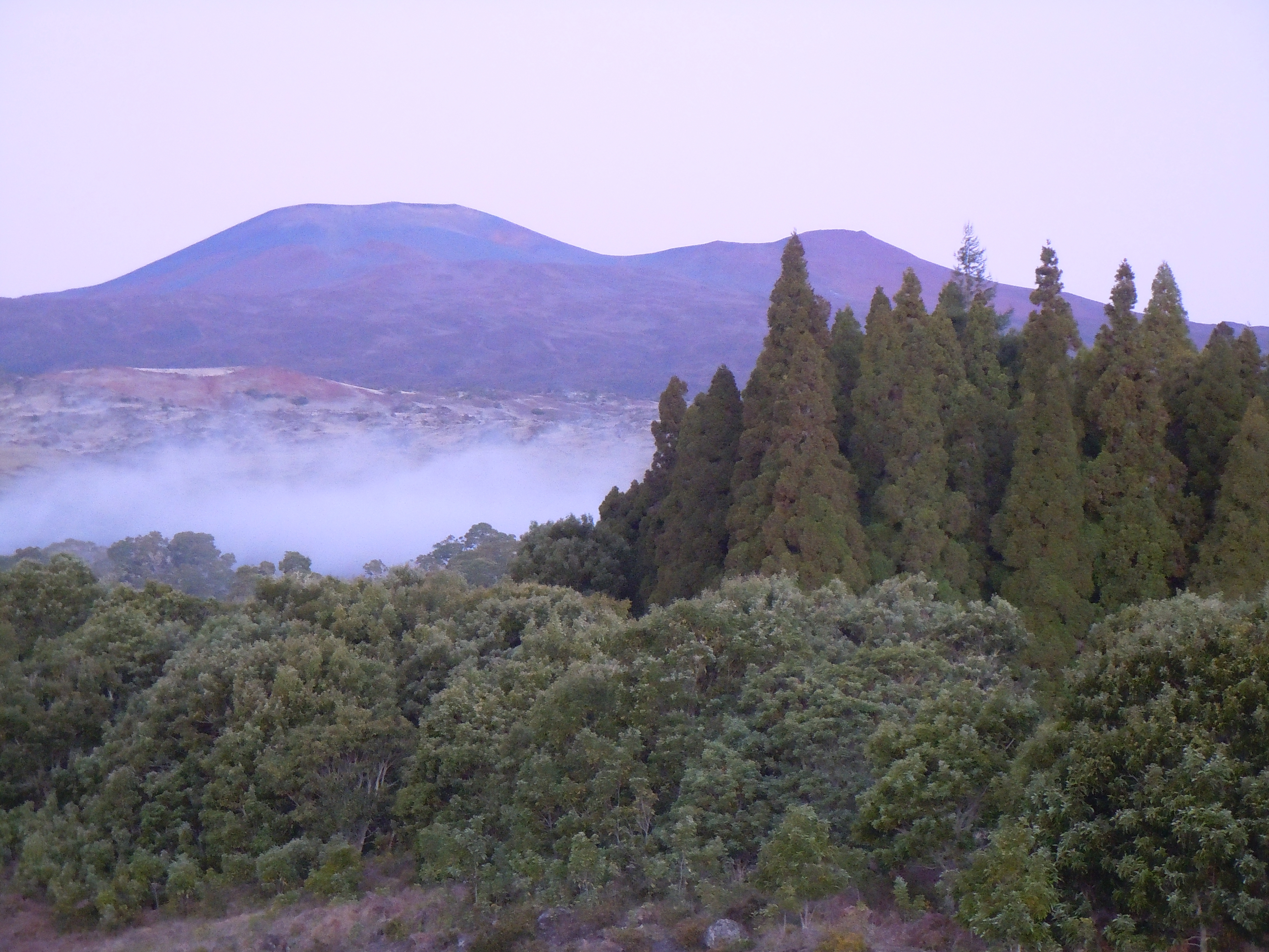 Hakalau Forest National Wildlife Refuge, HI March 2012 Photo: Noah Kahn/USFWS